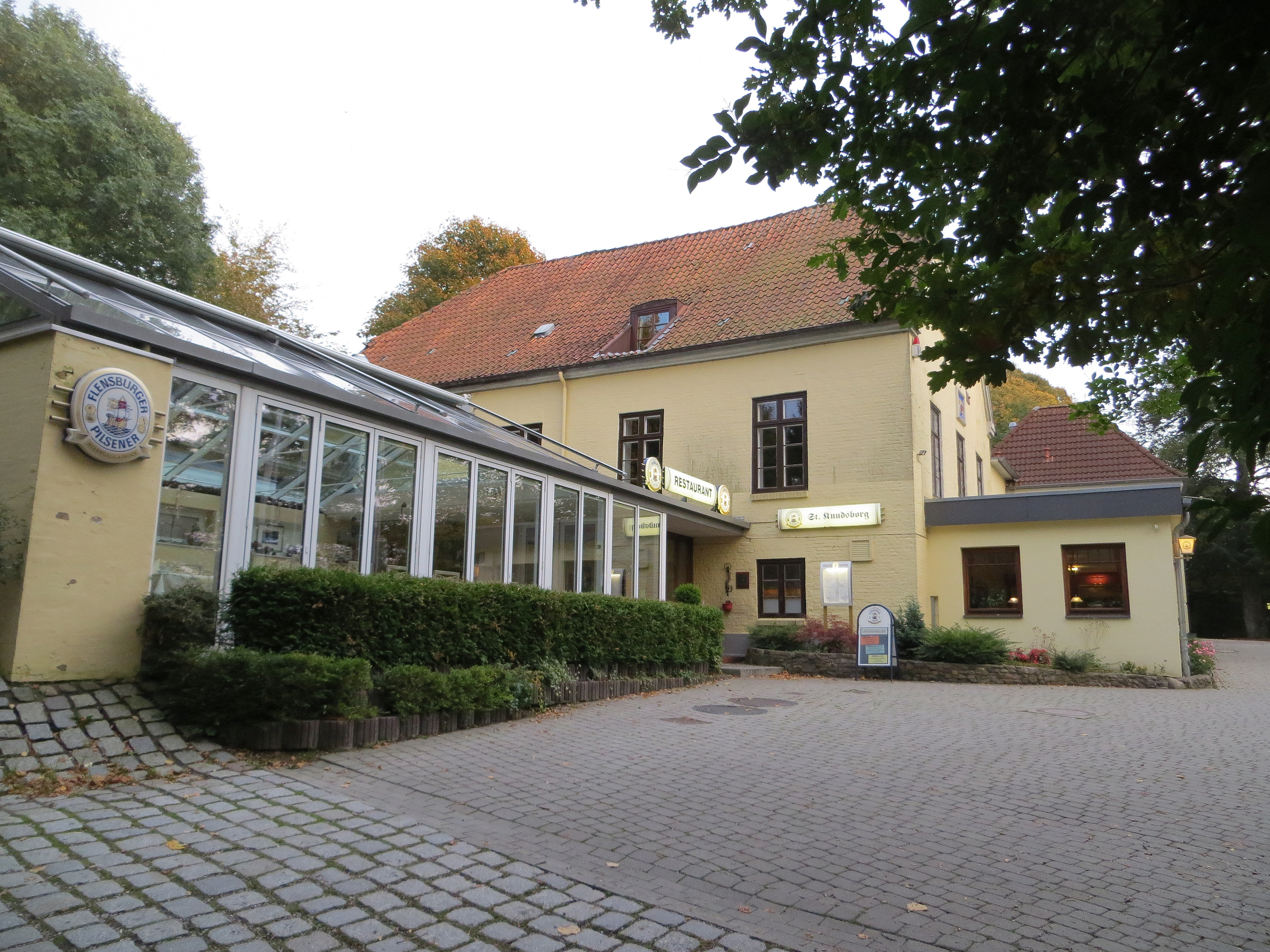 Restaurant St. Knudsborg, Flensburg, Bild 02